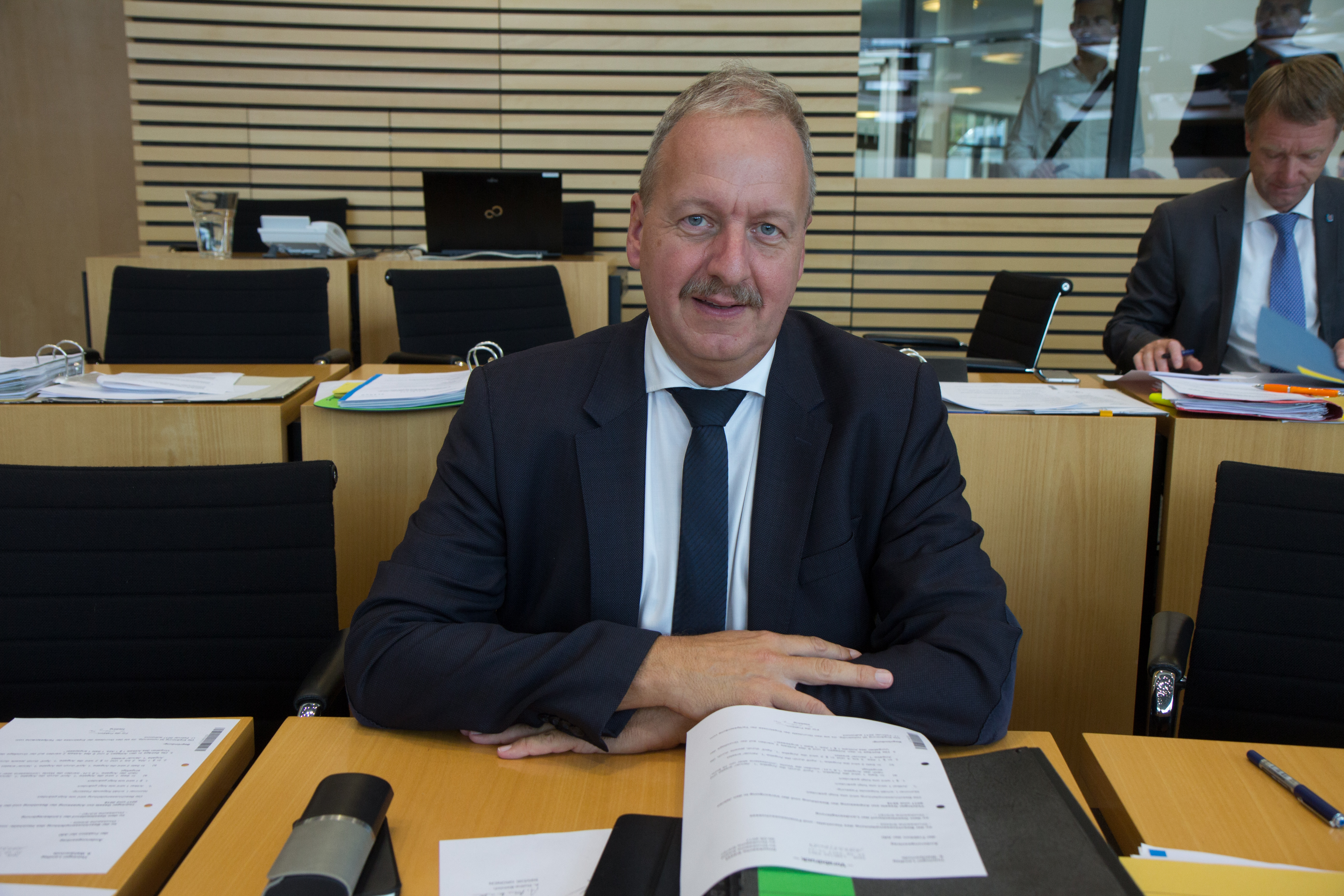 Jörg Geibert im Rahmen der Plenarsitzung des Thüringer Landtag am 30. August 2017 in Erfurt